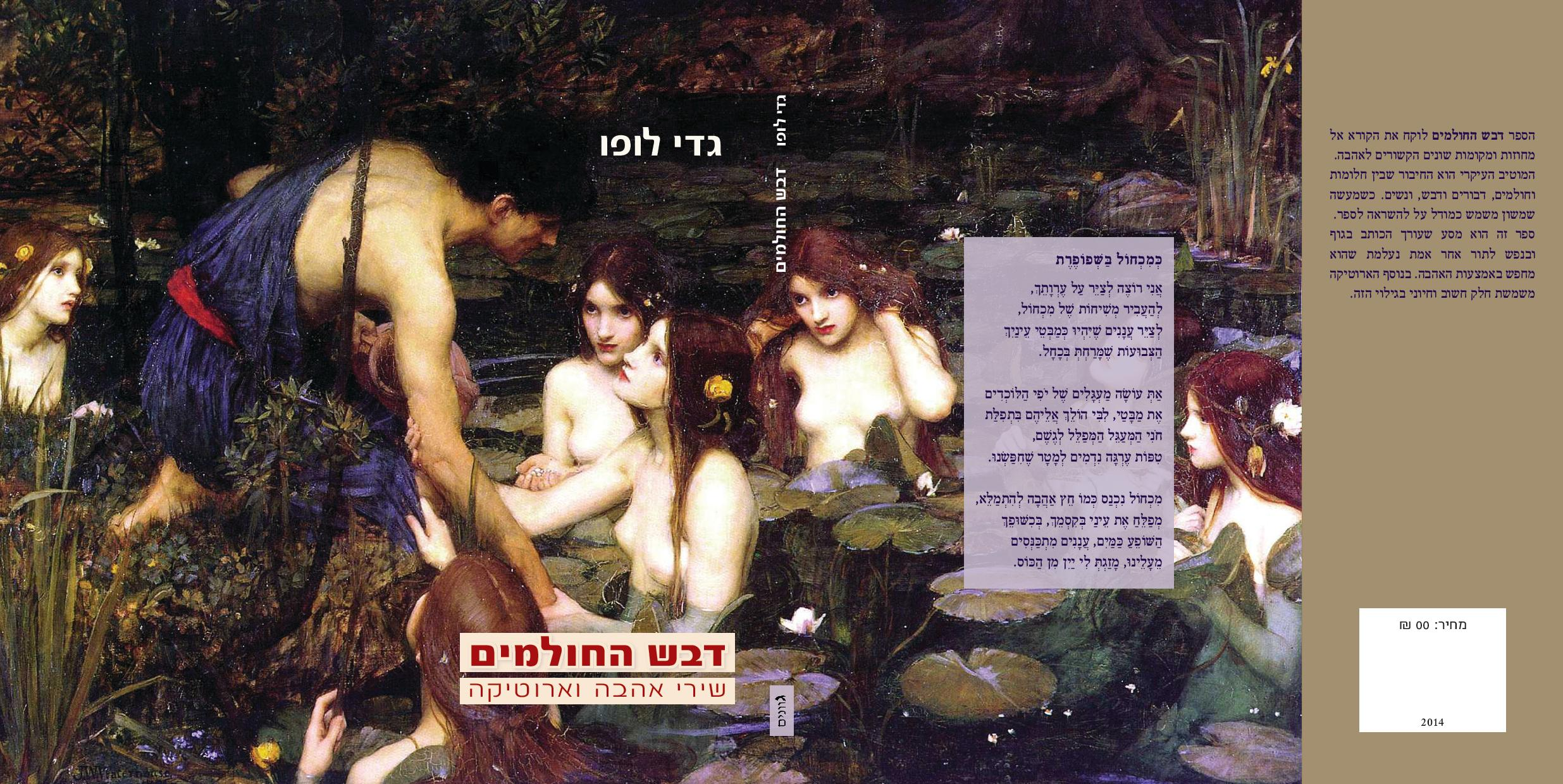 הציור "הילאס והנימפות" מאת הצייר האנגלי ג'ון ויליאם ווטרהאוס